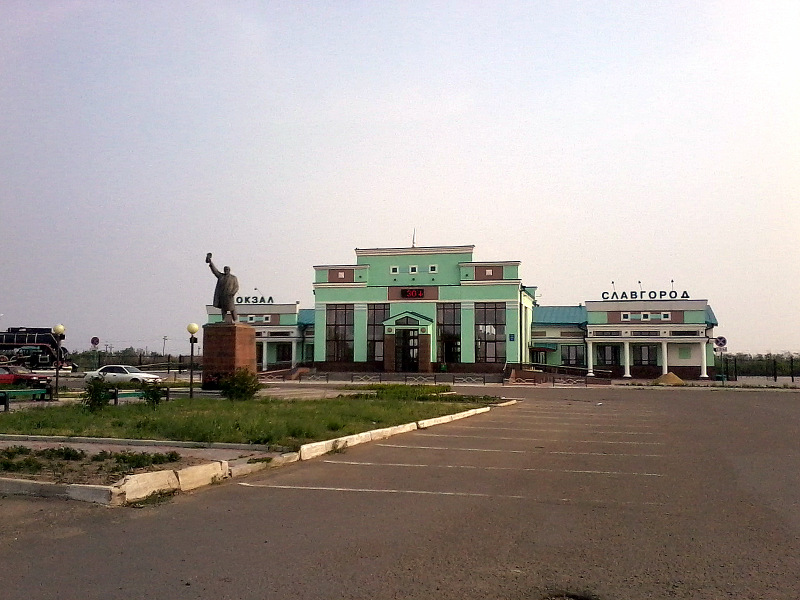 Славгород. Железнодорожный вокзал.